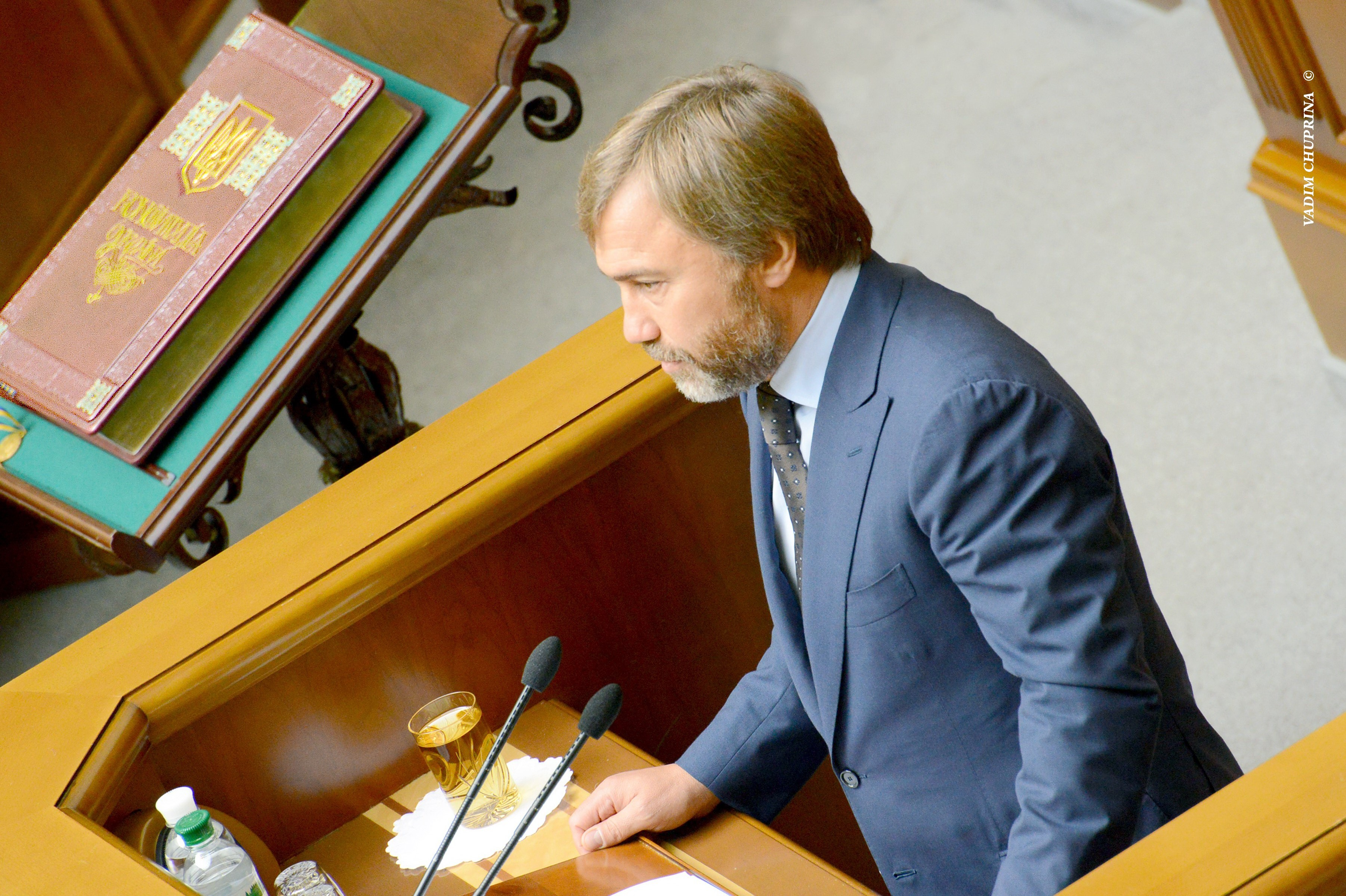 ВЕРХОВНА РАДА УКРАЇНИ 2013 , фото Вадим Чуприна